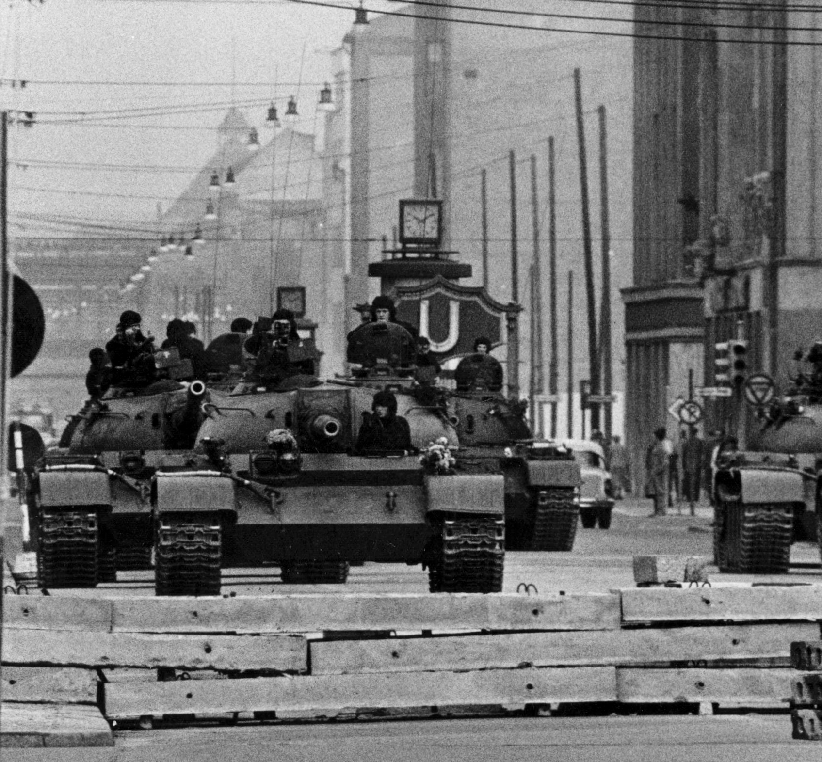 Carri sovietici T-55 di fronte al Check point Charlie a Berlino il 28 ottobre 1961